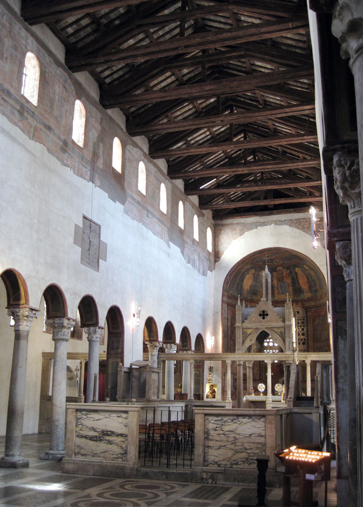 Santa Maria Inside